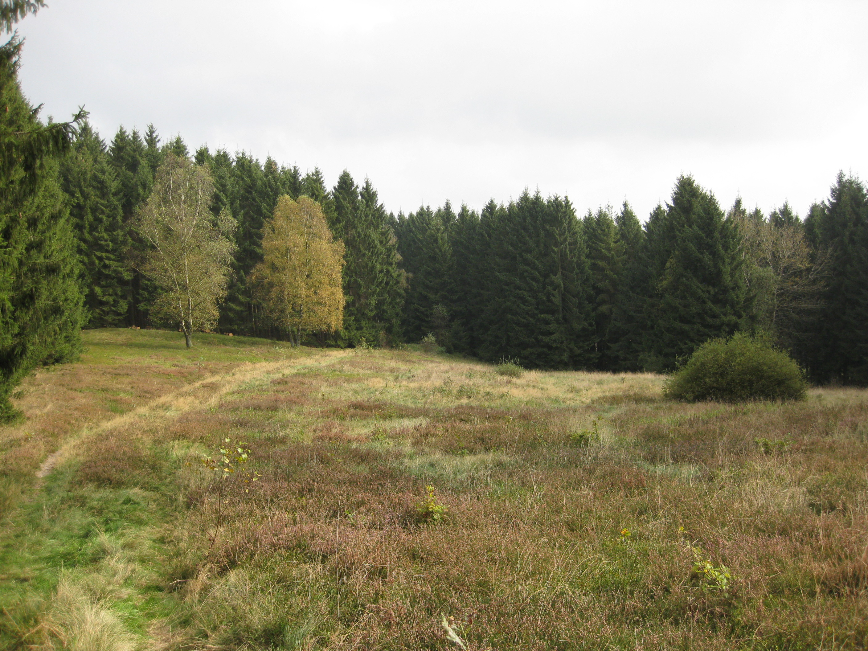 Naturschutzgebiet Gretenberg, Brilon, Nordrhein-Westfalen, Deutschland.